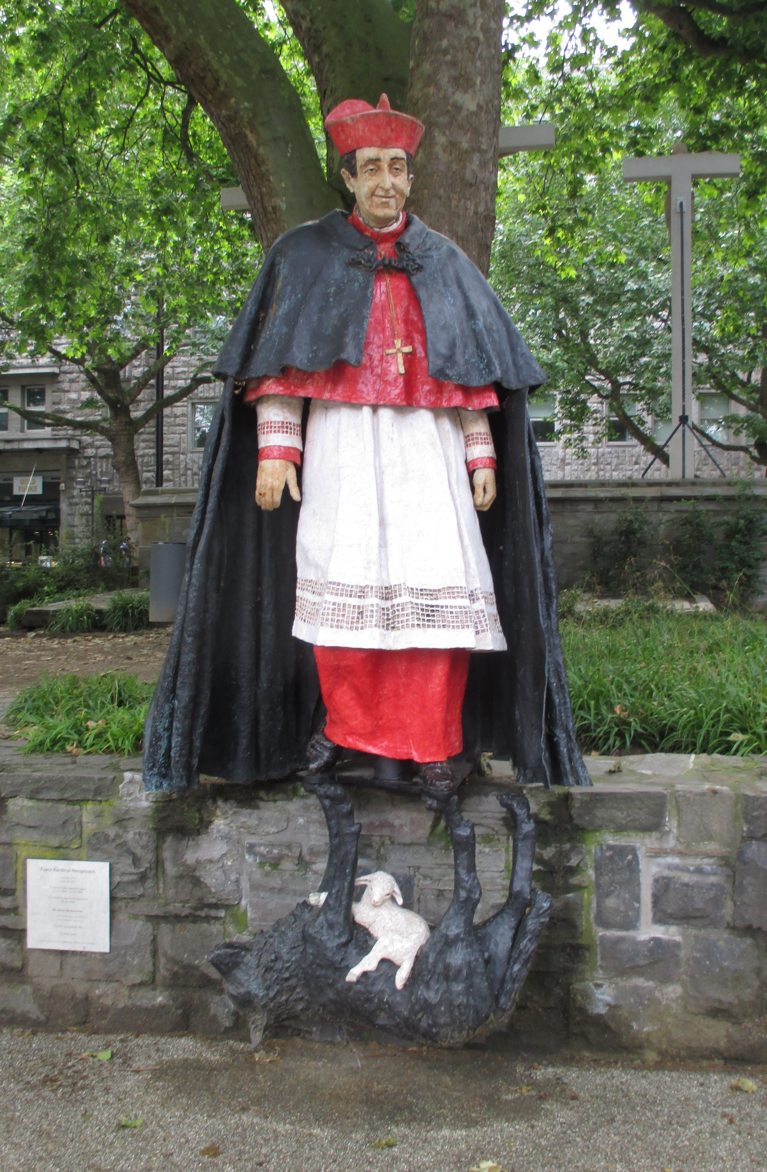 "Prinz Karneval" - Das umstrittene Hengsbachdenkmal am Essener Dom.